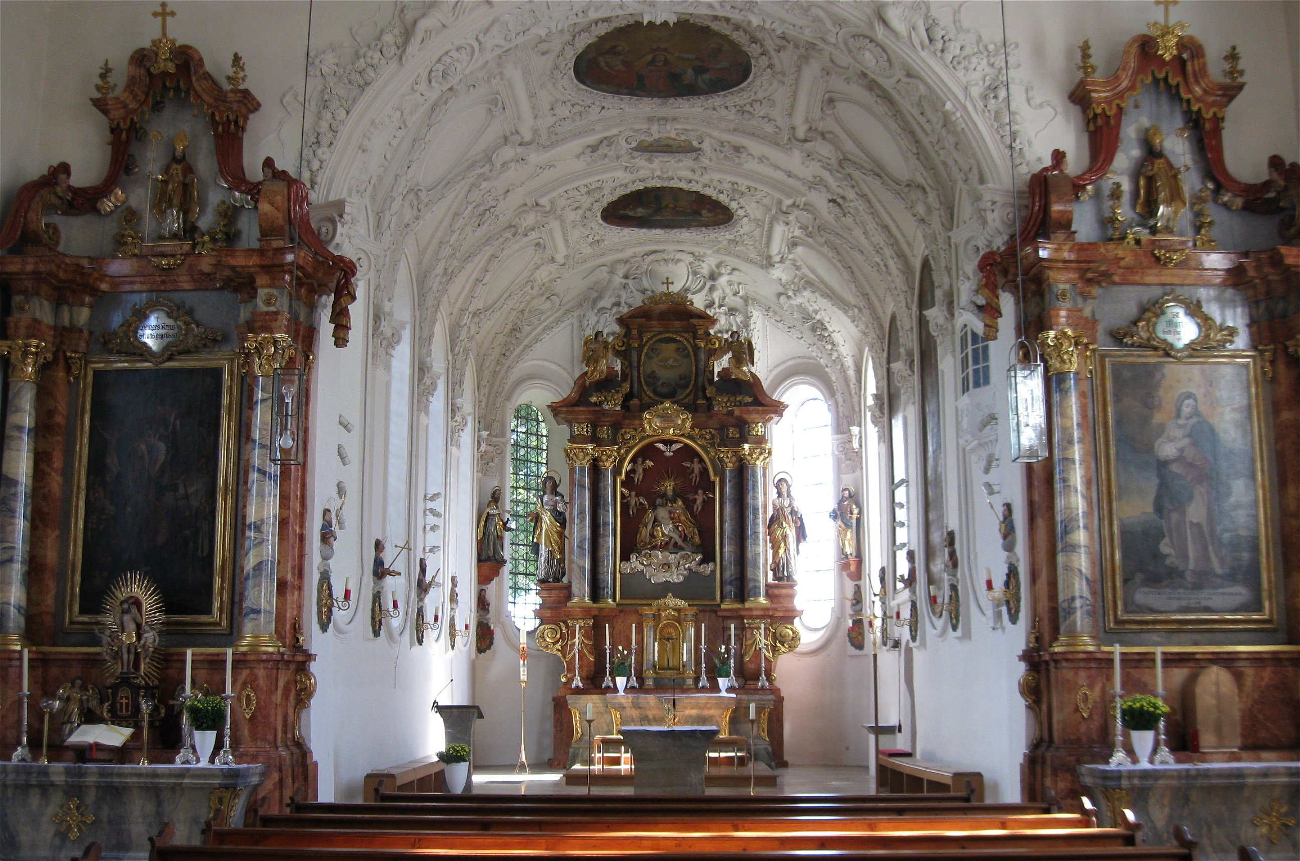 Zugspitzstraße 13. Kath. Wallfahrtskirche Hl. Blut am Wasen, Saalbau, Chor im Kern spätgotisch, 1686/87 barockisiert, Langhaus 1610/11, dem Chor um 1690 angeglichen; mit Ausstattung; Brunnenkapelle, gen. "Der Brunn", Achteckbau mit schindelgedeckter Laternenkuppel, Johann Mayr d.Ä. von der Hausstatt, Ende 17. Jh.; mit Ausstattung; nördlich neben der Kirche.